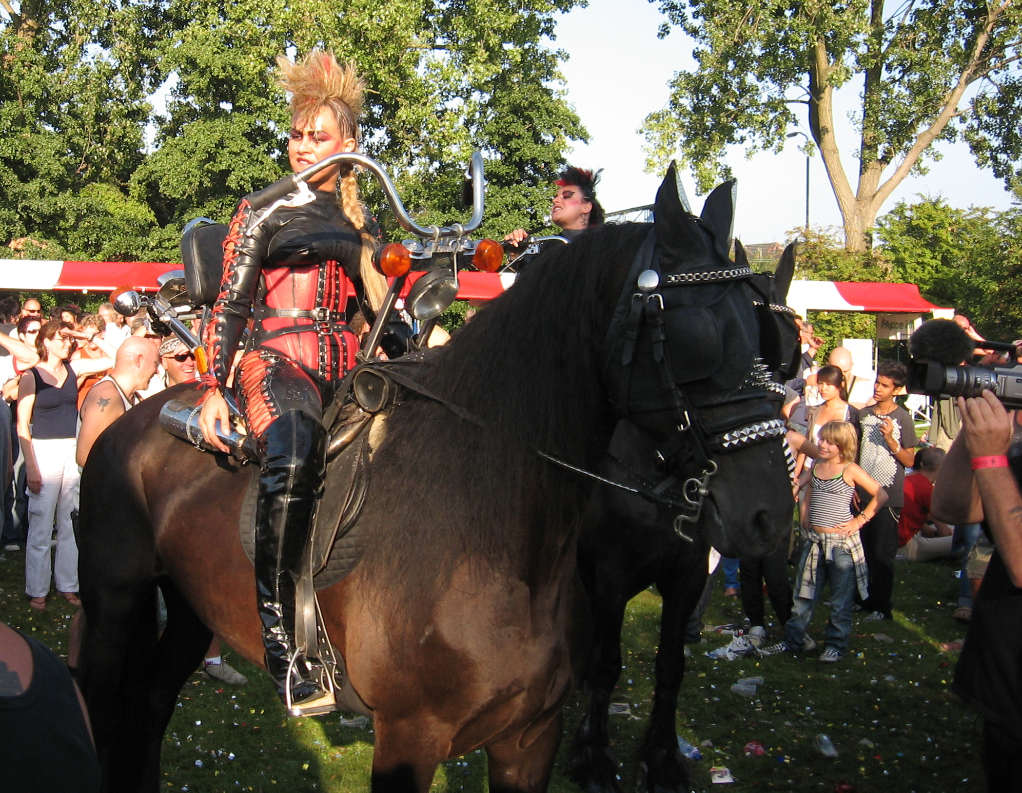 een foto van alternatief Westerpop 2007